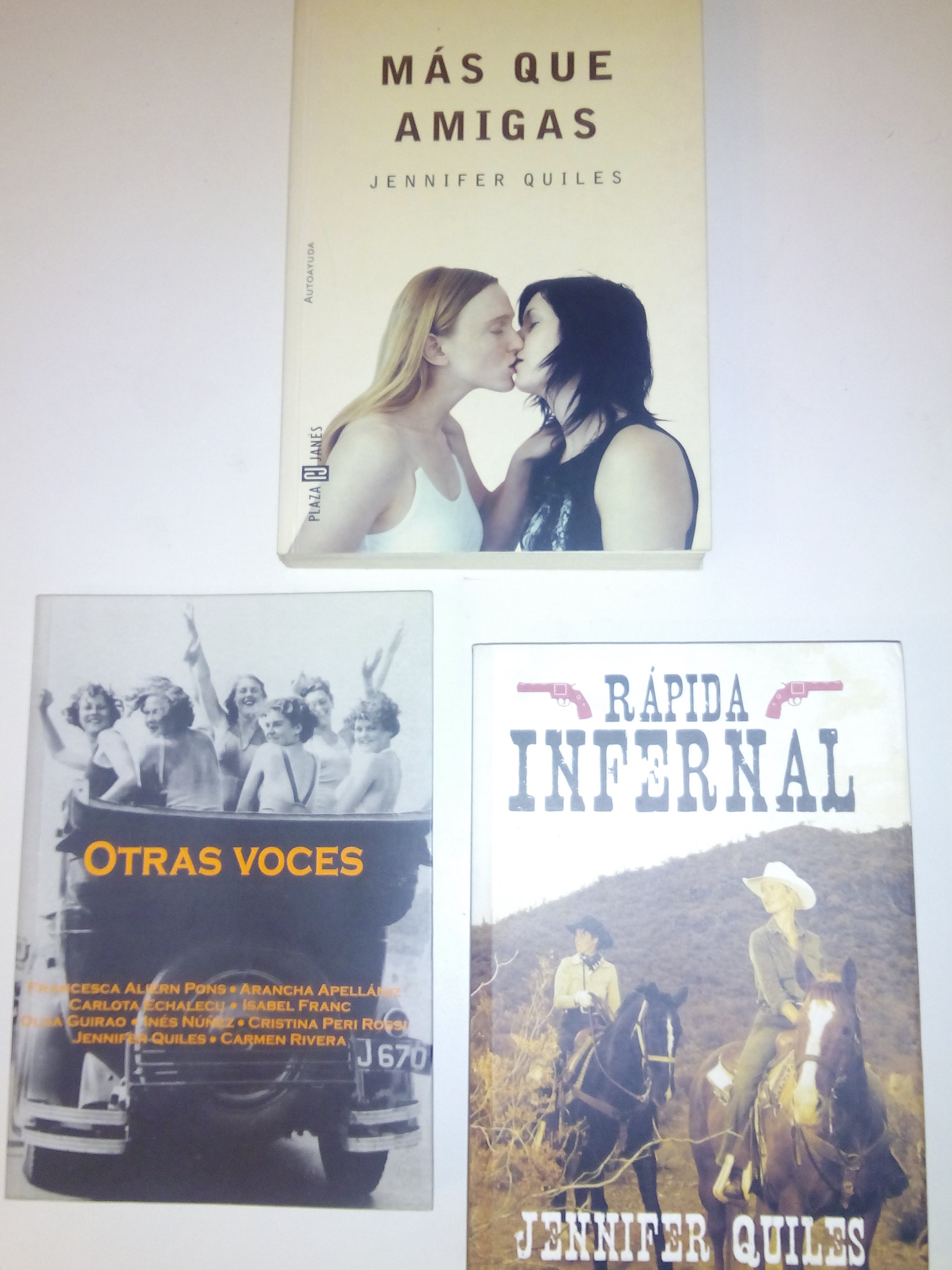 Portada de les dues publicacions de Jennifer Quiles i del llibre on va publicar un relat.